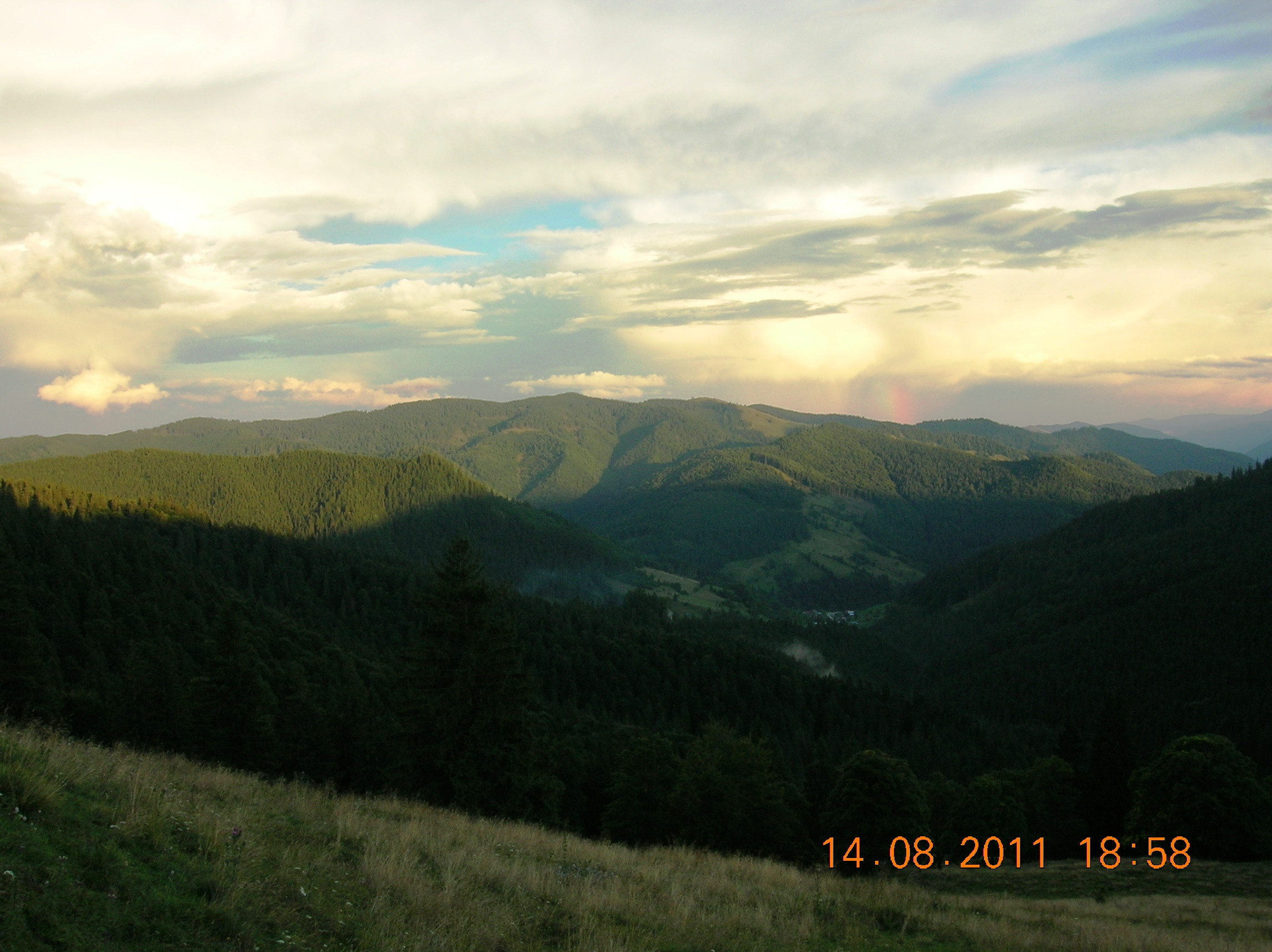 Munţii Stânişoarei (Carpaţii Orientali, România) - mai jos de Pasul Tarnița - dincolo de crestele din fundal este Pasul Stînișoara.